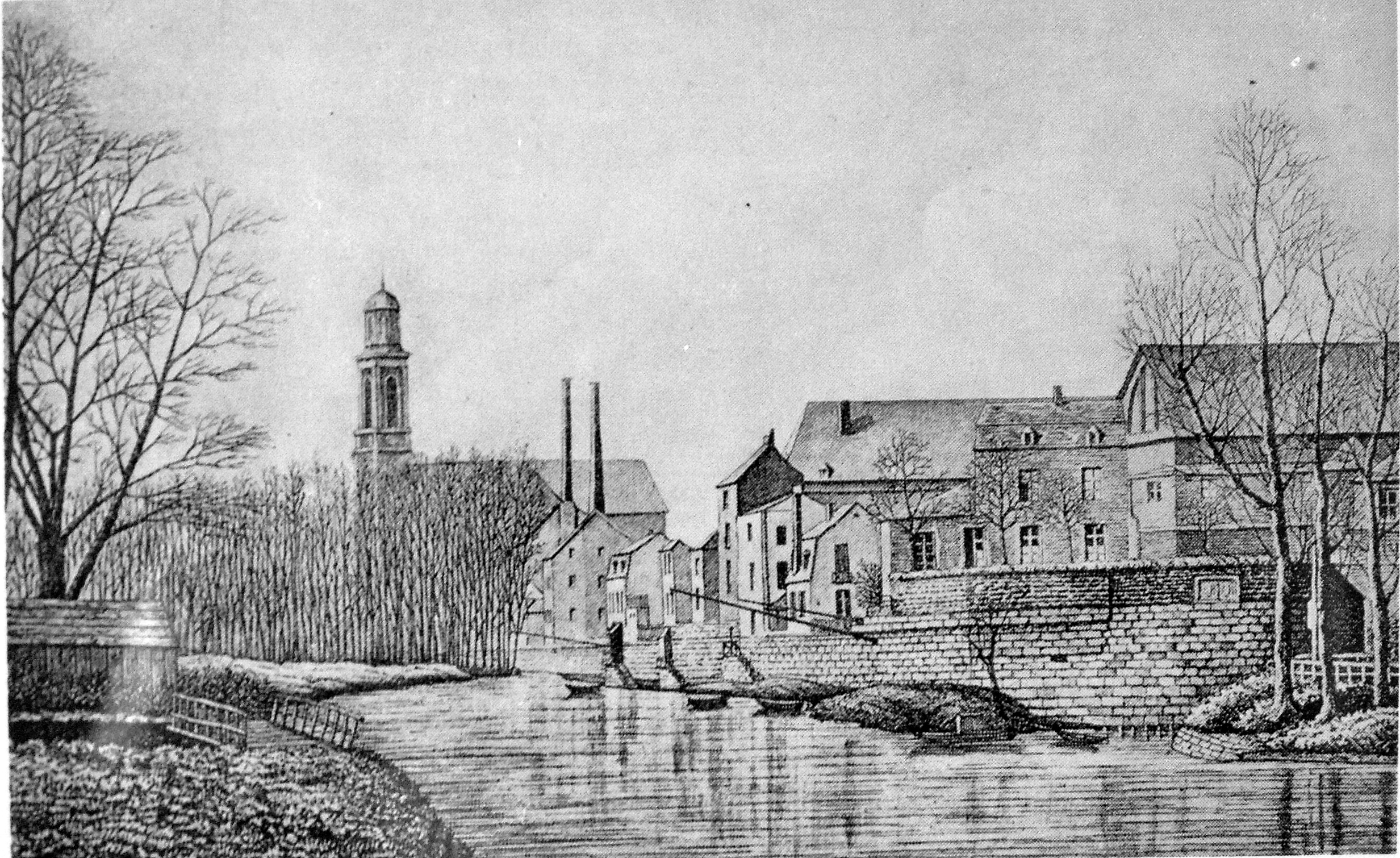 Liège, le Barbou 1858